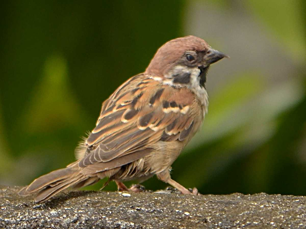 Burung Gereja Erasia (Passer montanus)